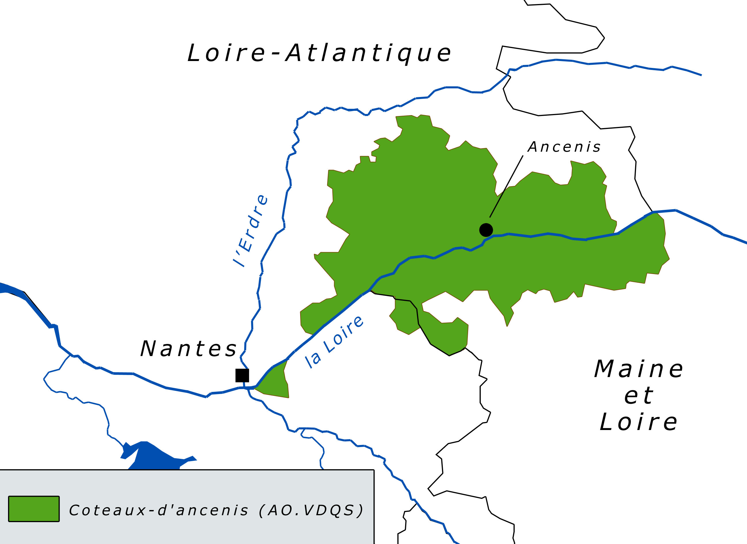 Carte du vignoble Coteaux-d'ancenis (AOVDQS)